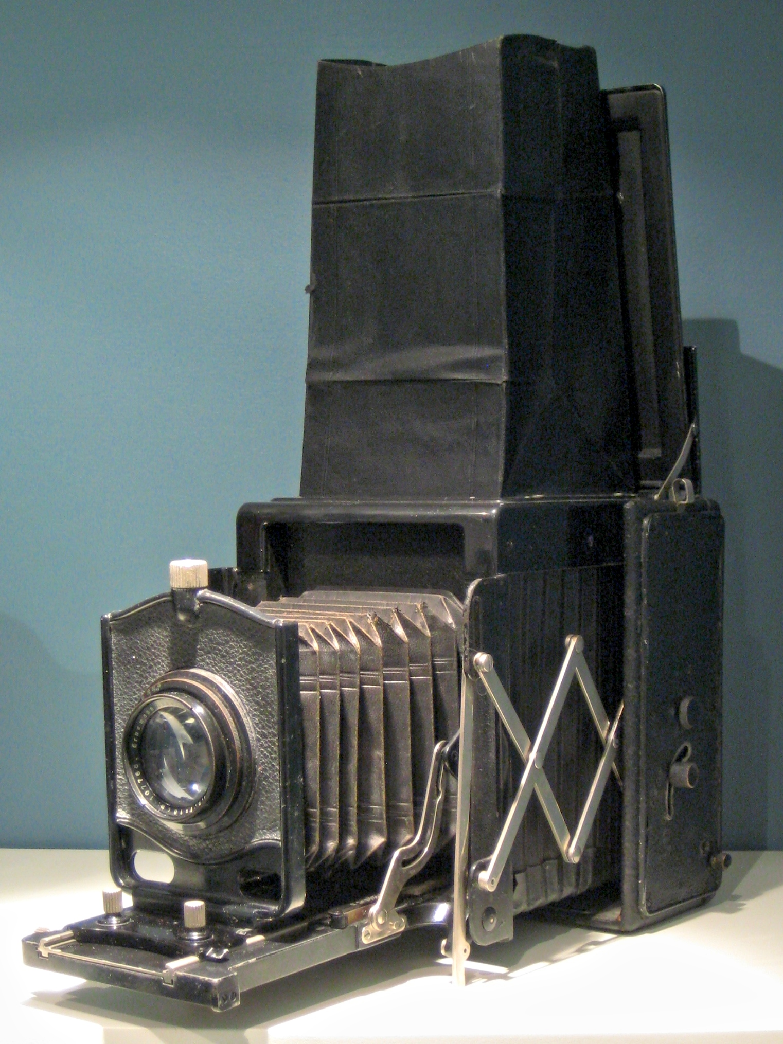 Ernoflex, Ernemann AB, Dresden. 9x12 cm - Patent-Reflexkamera, 1923-27